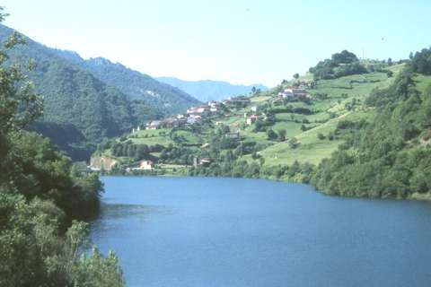 Foto del pueblo de Coballes en un día soleado